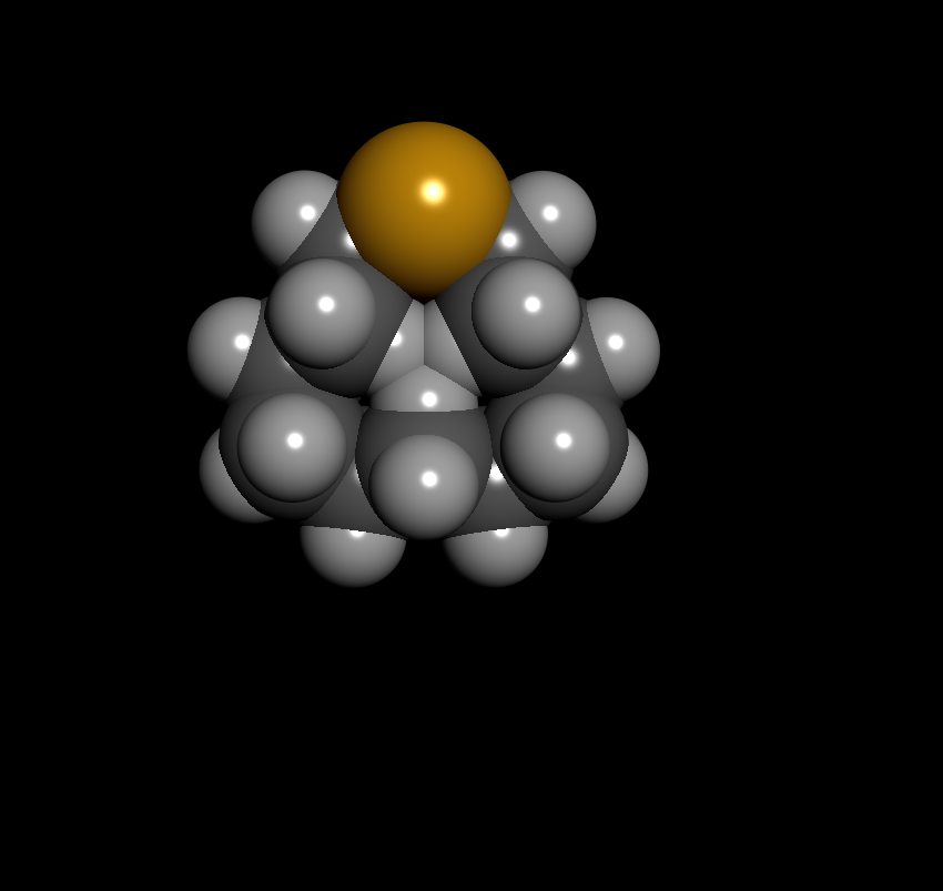 Модел на тиациклододекан